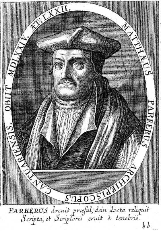 Kupferstich Matthew Parker (1504-1575); Theologe, Erzbischof